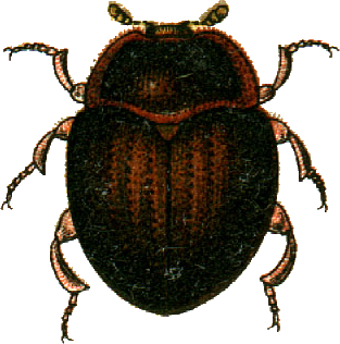 This file has been extracted from another file: Jacobs18.jpg